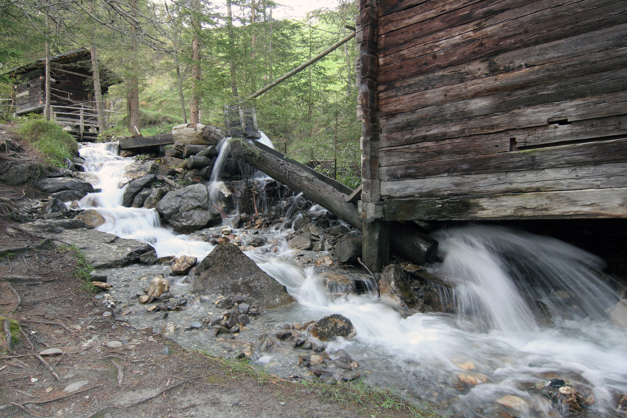 Kalser Stockmühle (Obenfiger- und Plotzamühle)